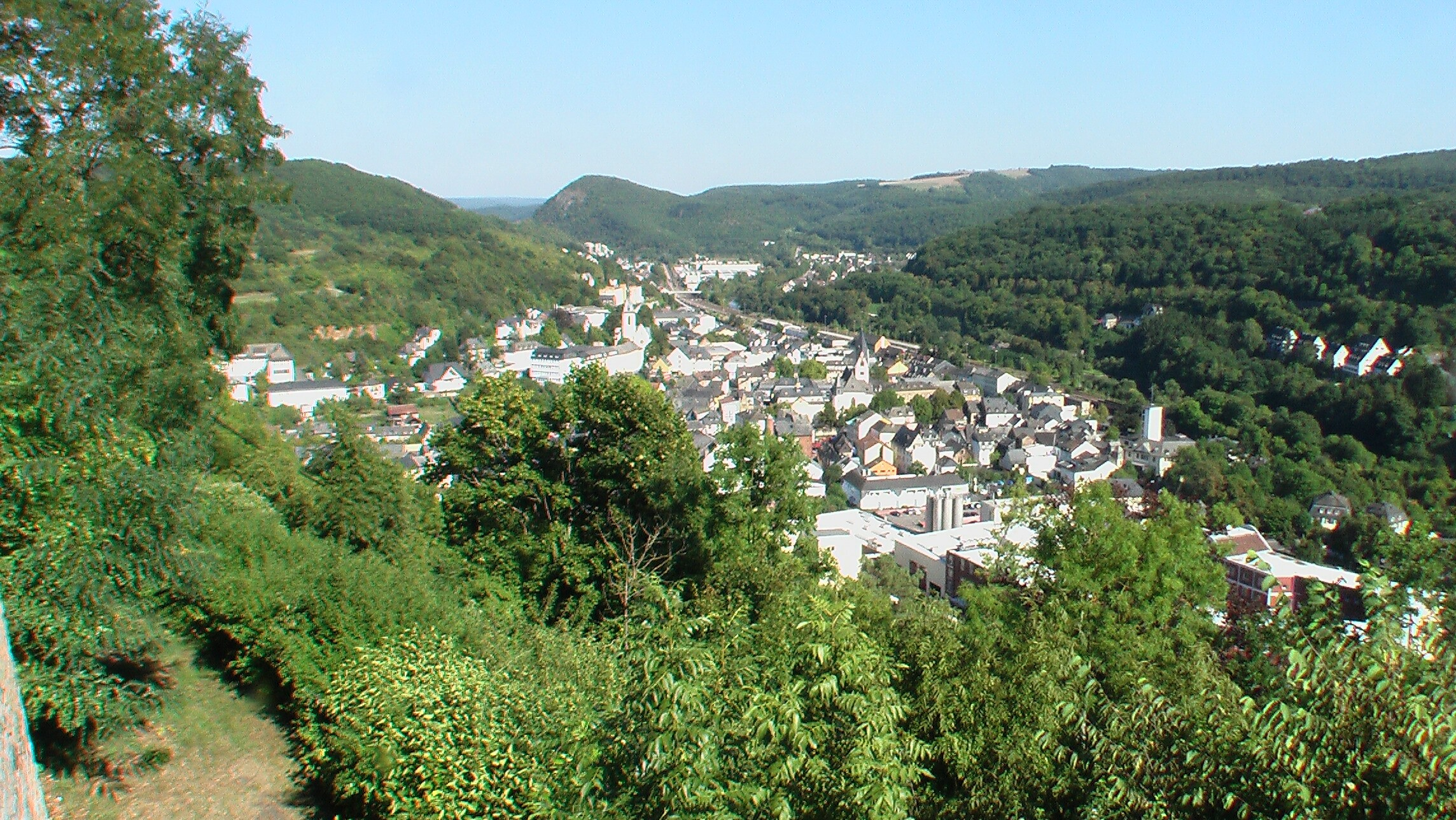 KirnVonDerKyrburg